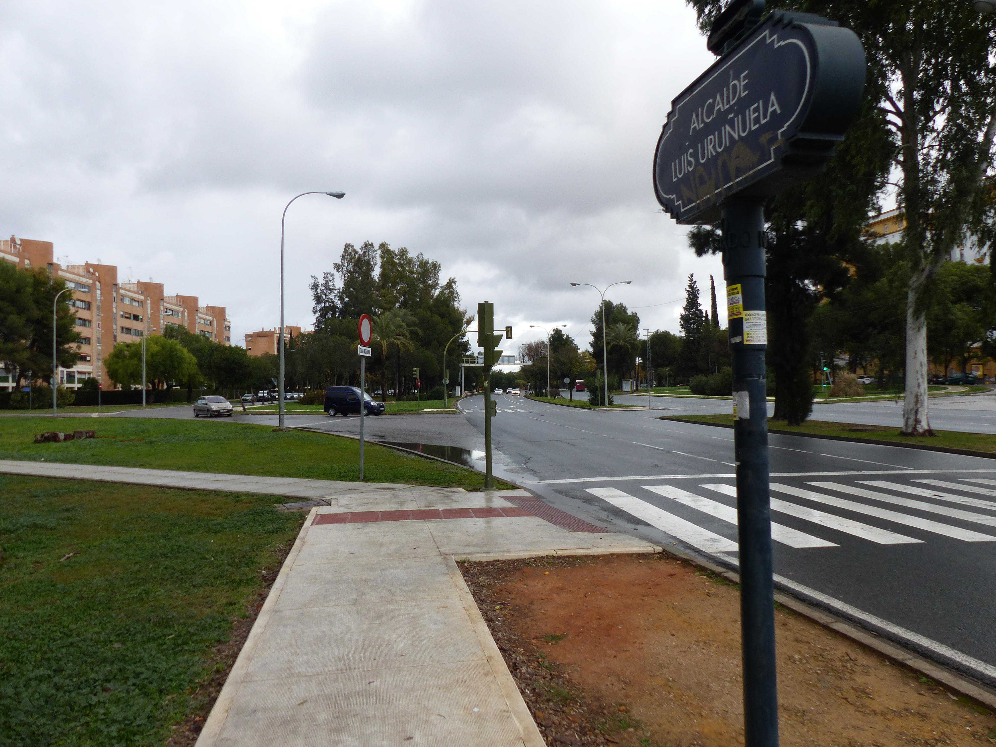 Avenida Alcalde Luis Uruñuela